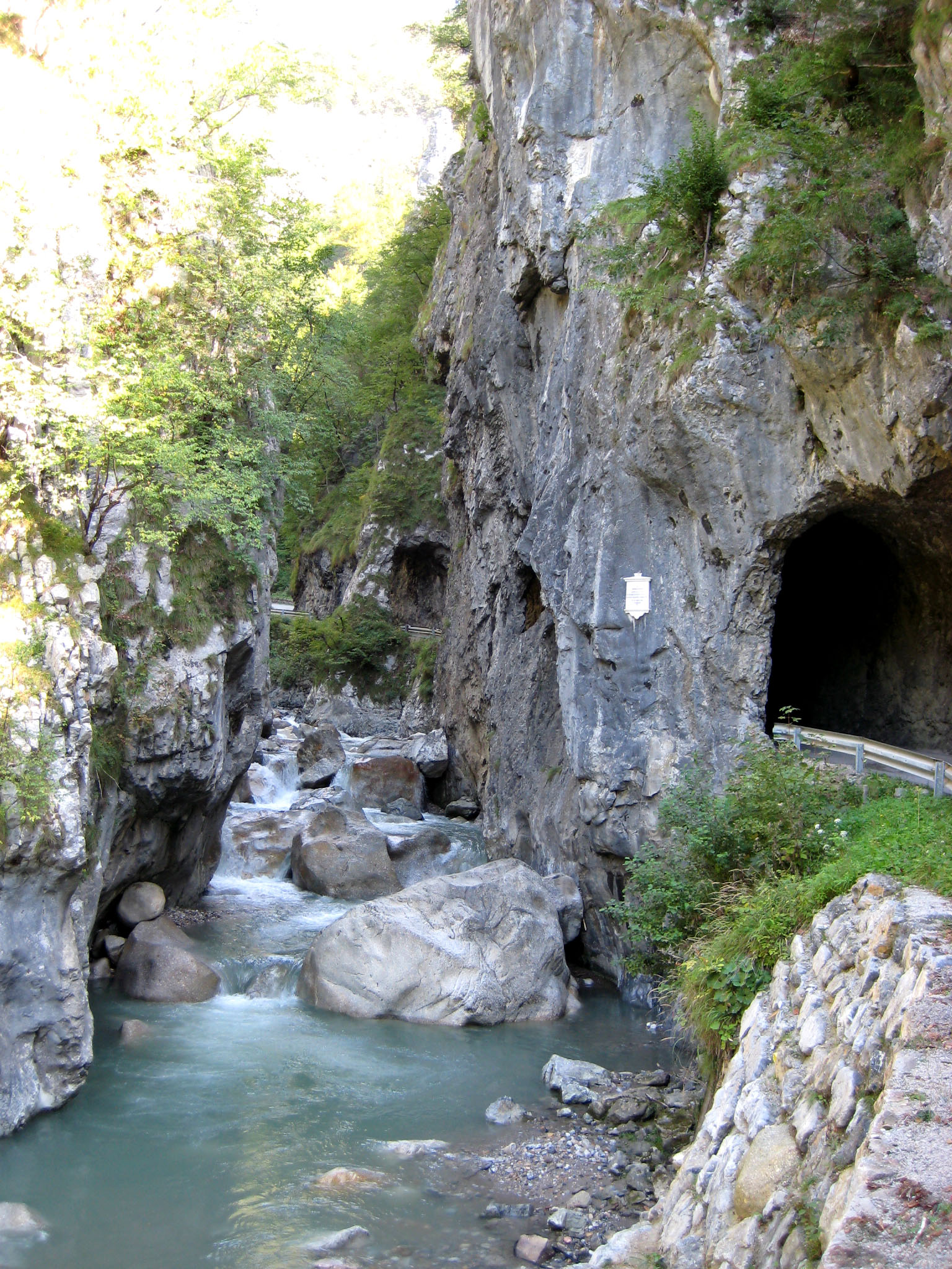 Tržiška Bistrica, alpine river in Slovenia